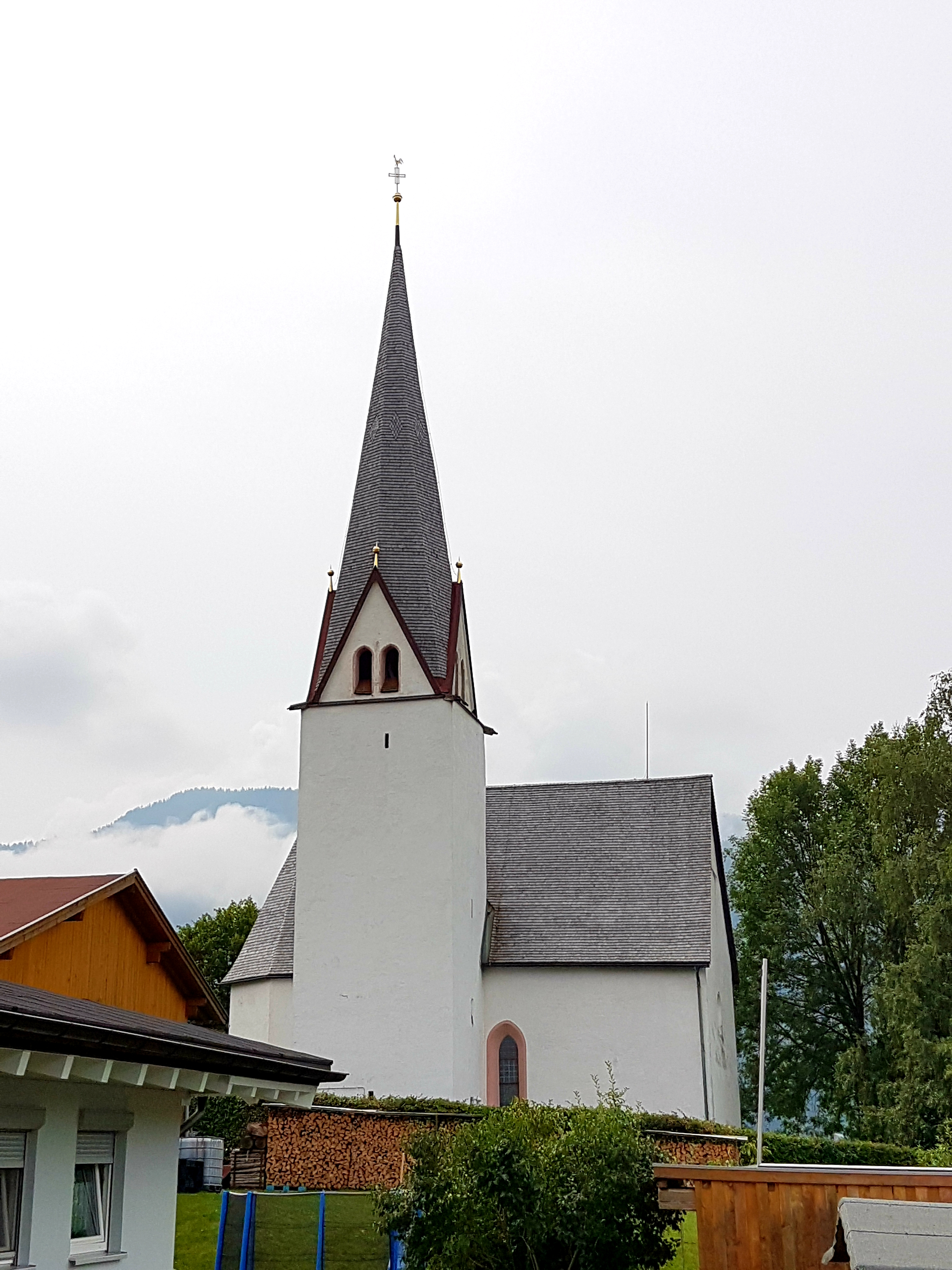 Kath. Filialkirche hl. Johannes der Täufer und ehem. Friedhof